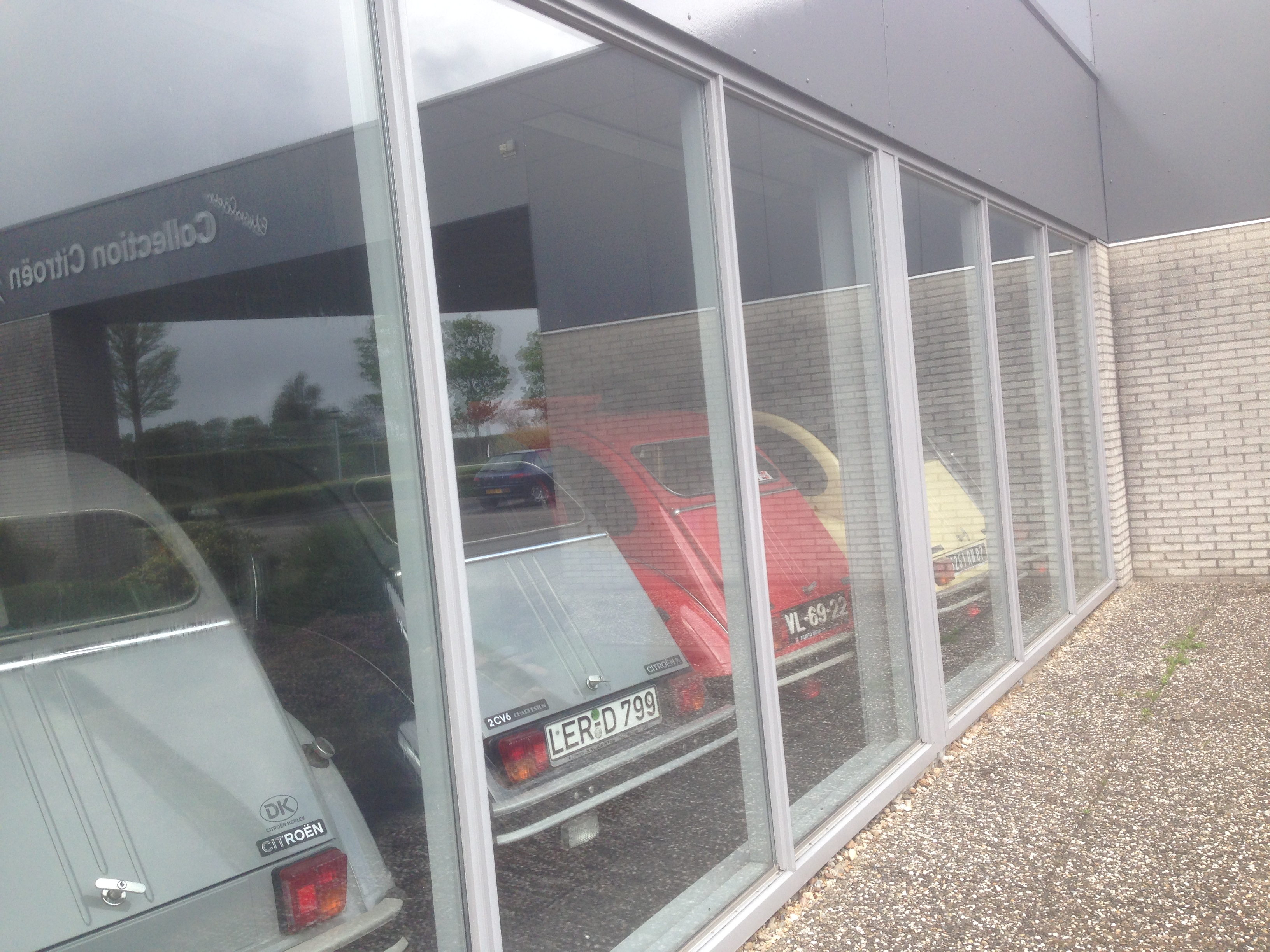 Eendenmuseum (Citroën 2CV)[1]